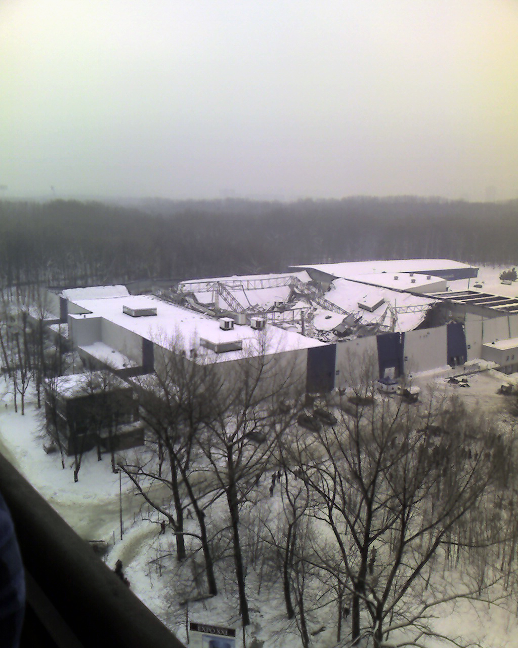 Katastrofa hali w Katowicach, 2006